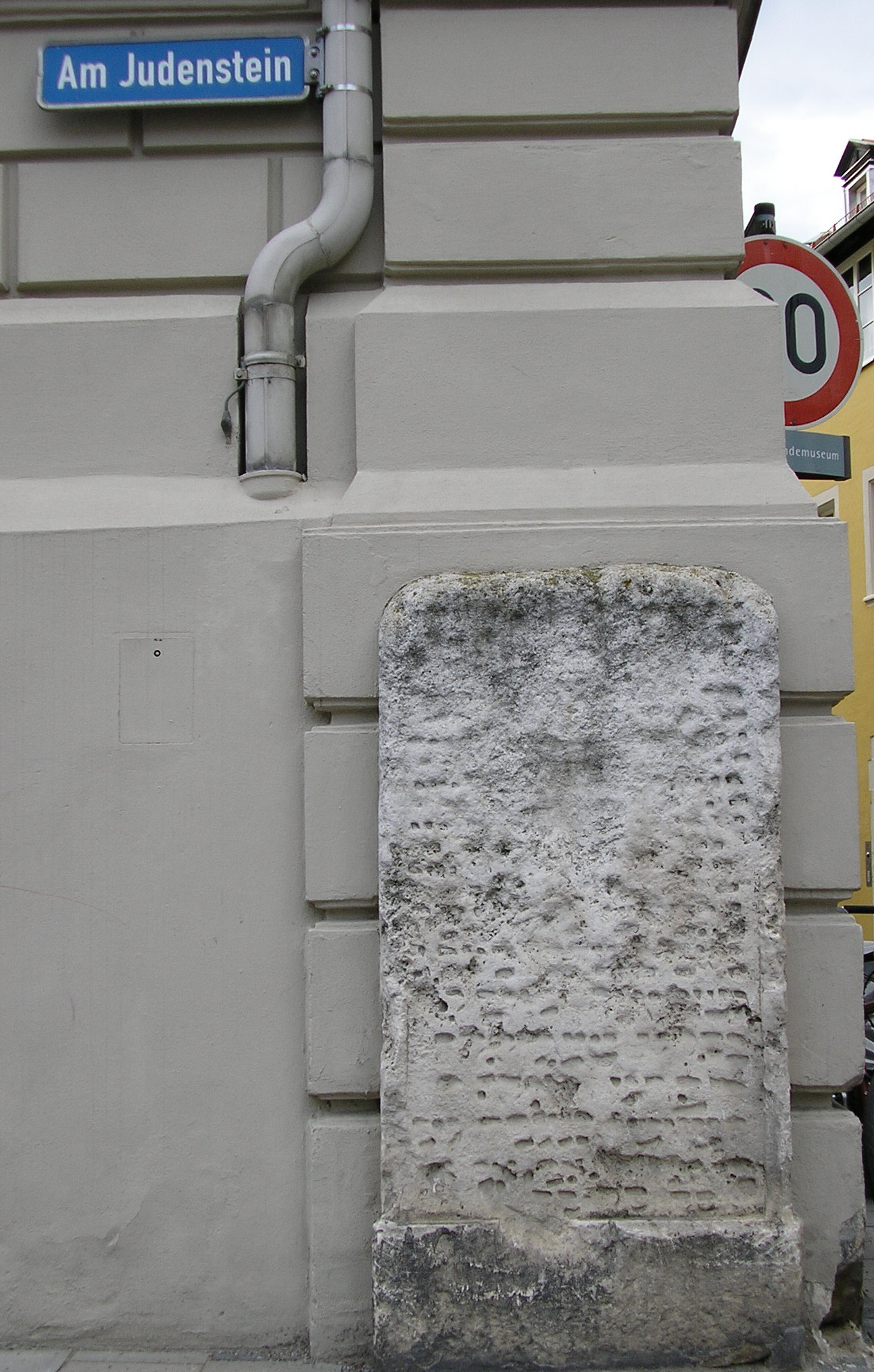 Geraubter jüdischer Grabstein in Regensburg, Am Judenstein. Aufnahme Mai 2012